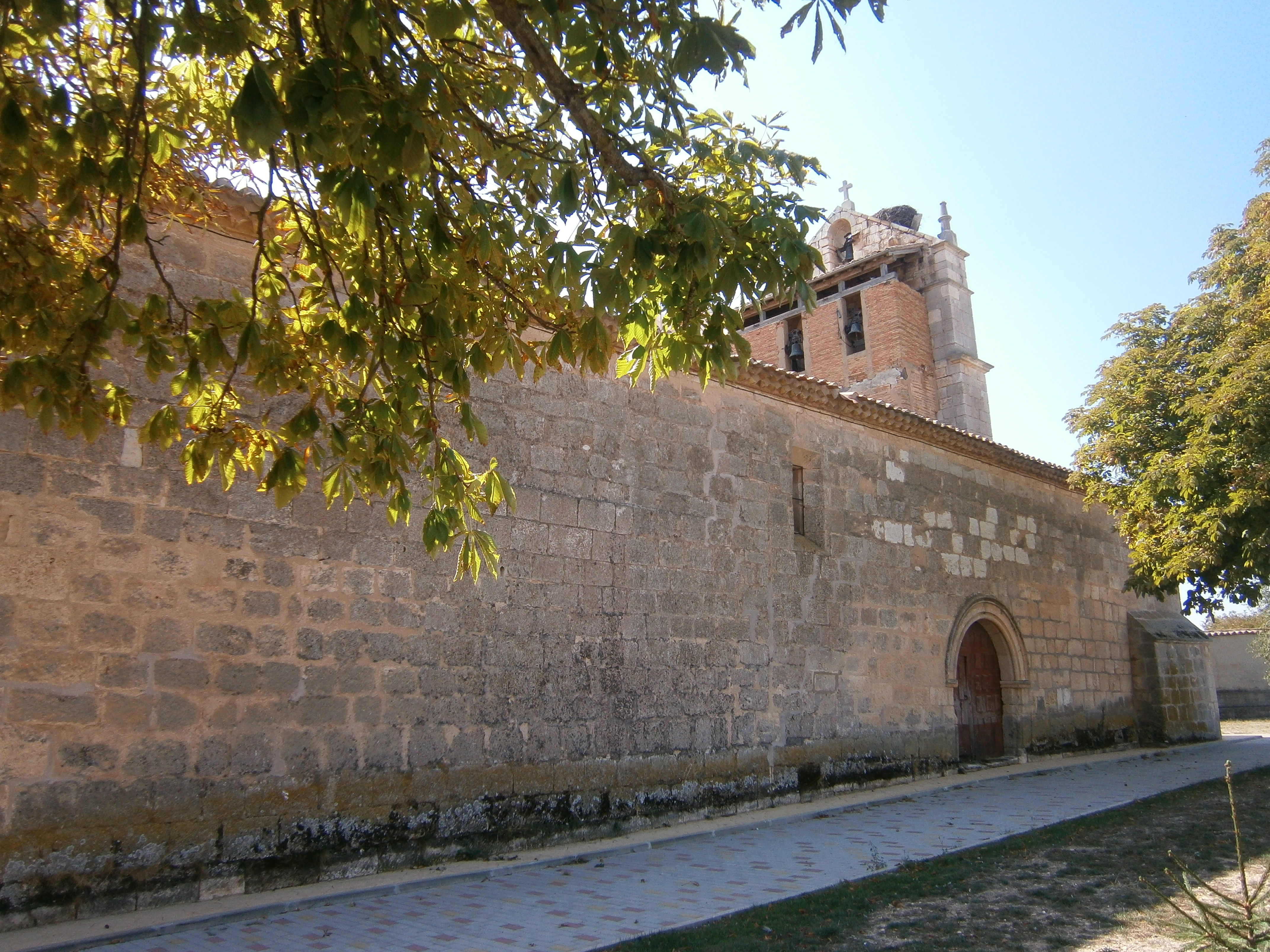 Iglesia adosada al Monasterio de Santa María la Real en Villamayor de los Montes